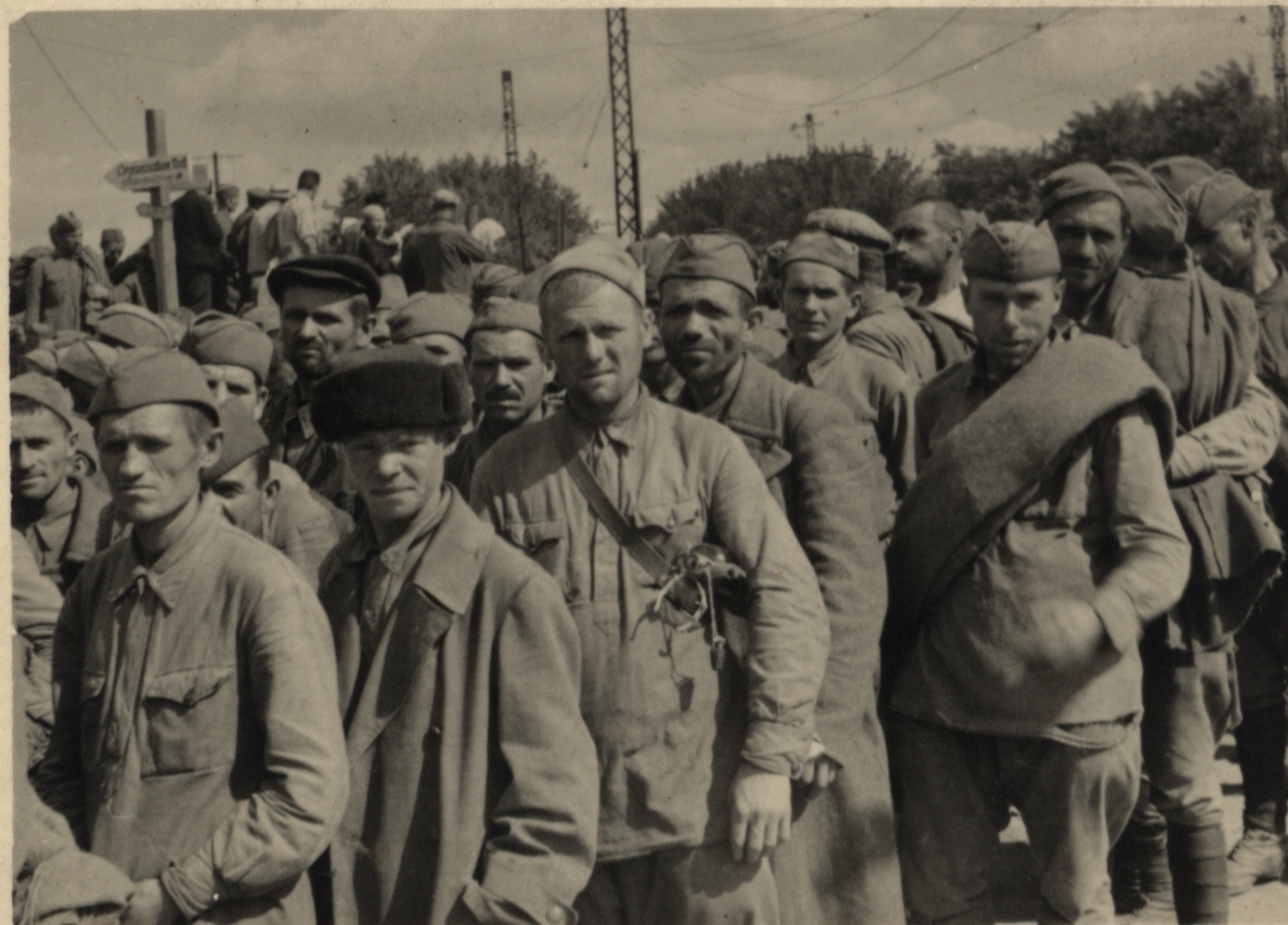 Jeńcy radzieccy w drodze do niewoli w Lamsdorf